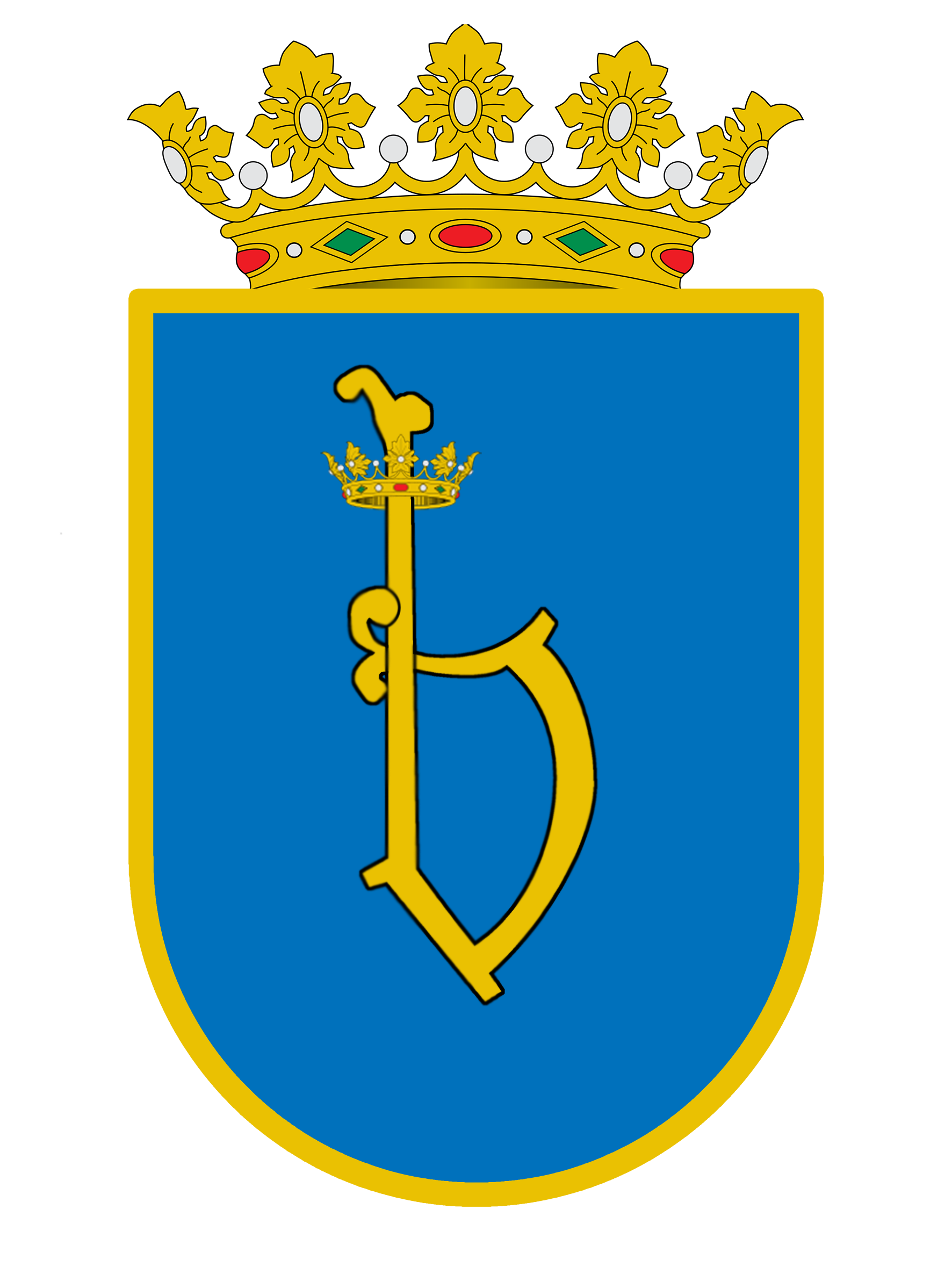 escudo del señorio de Veruela